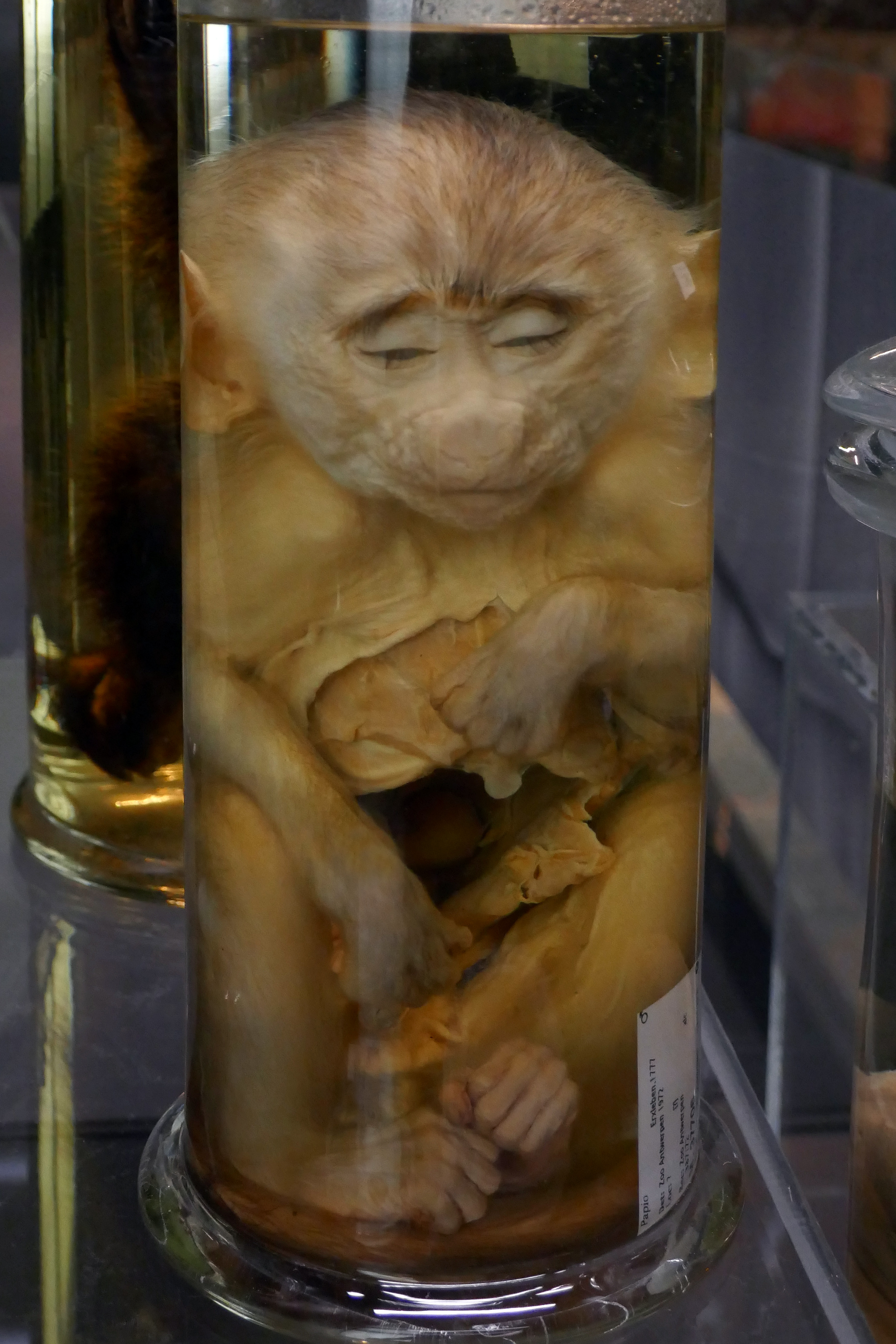 Babouin (Papio) conservé à l'Africa Museum (Tervuren), en provenance du zoo d'Anvers, 1972.